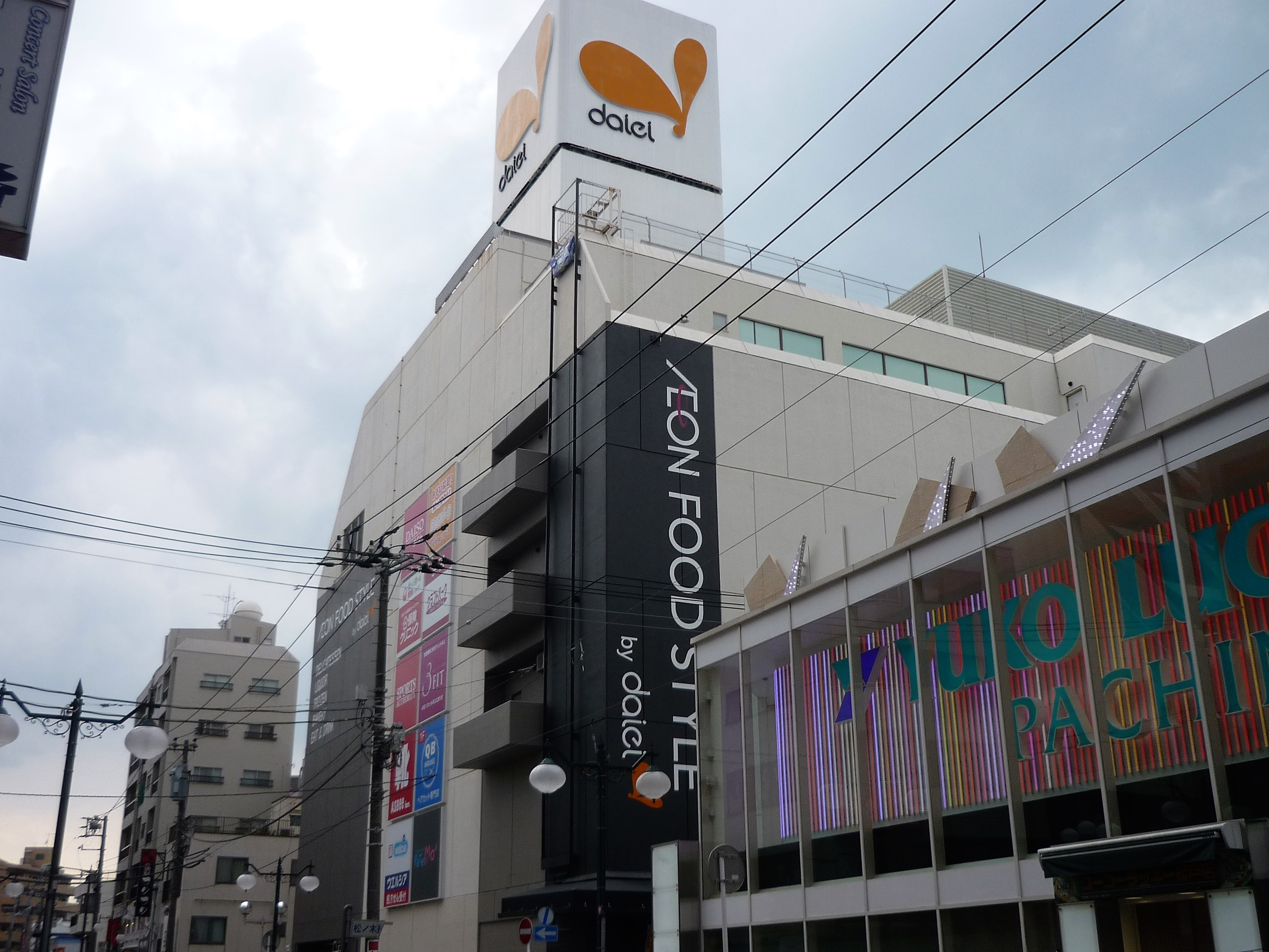 ダイエー松戸西口店